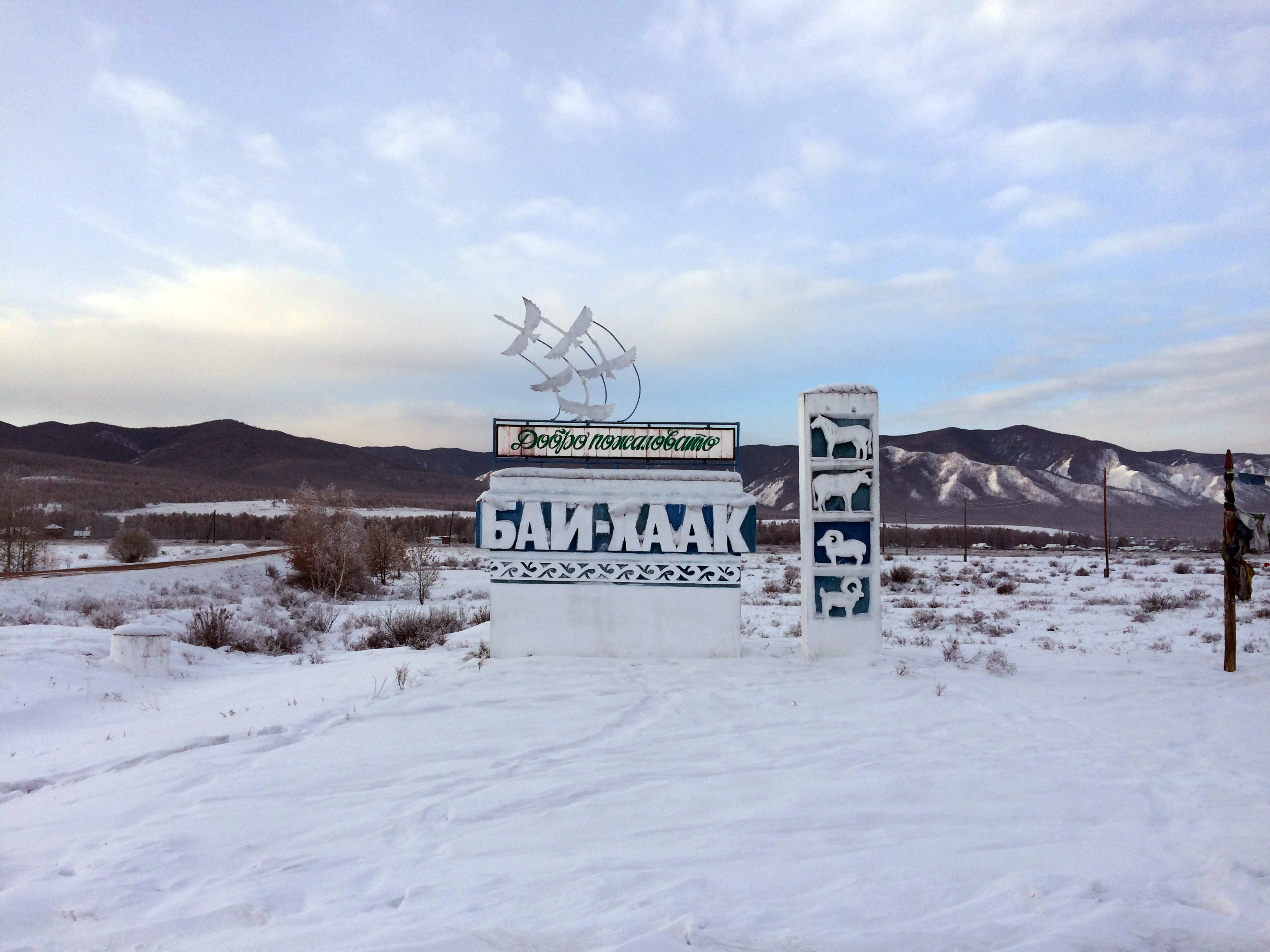 Адрес сумона Бай-Хаак. Тыва дыл: Бай-Хаак сумунуң адрези